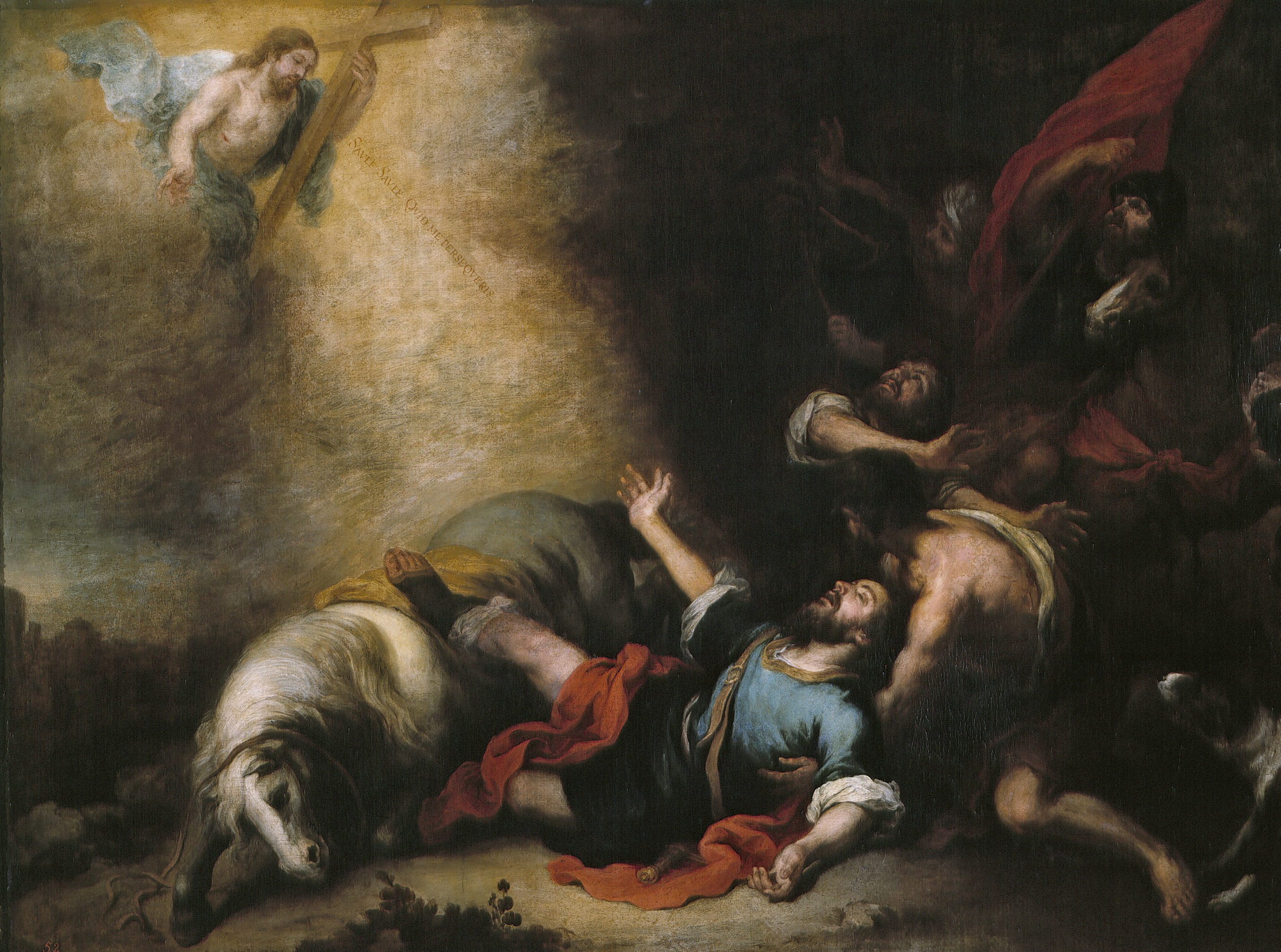 La obra representa el momento en que el apóstol San Pablo, cuyo verdadero nombre era Pablo de Tarso, se convirtió al cristianismo después de que Cristo se le apareciera cuando se dirigía a Damasco para perseguir a los cristianos de dicha ciudad.